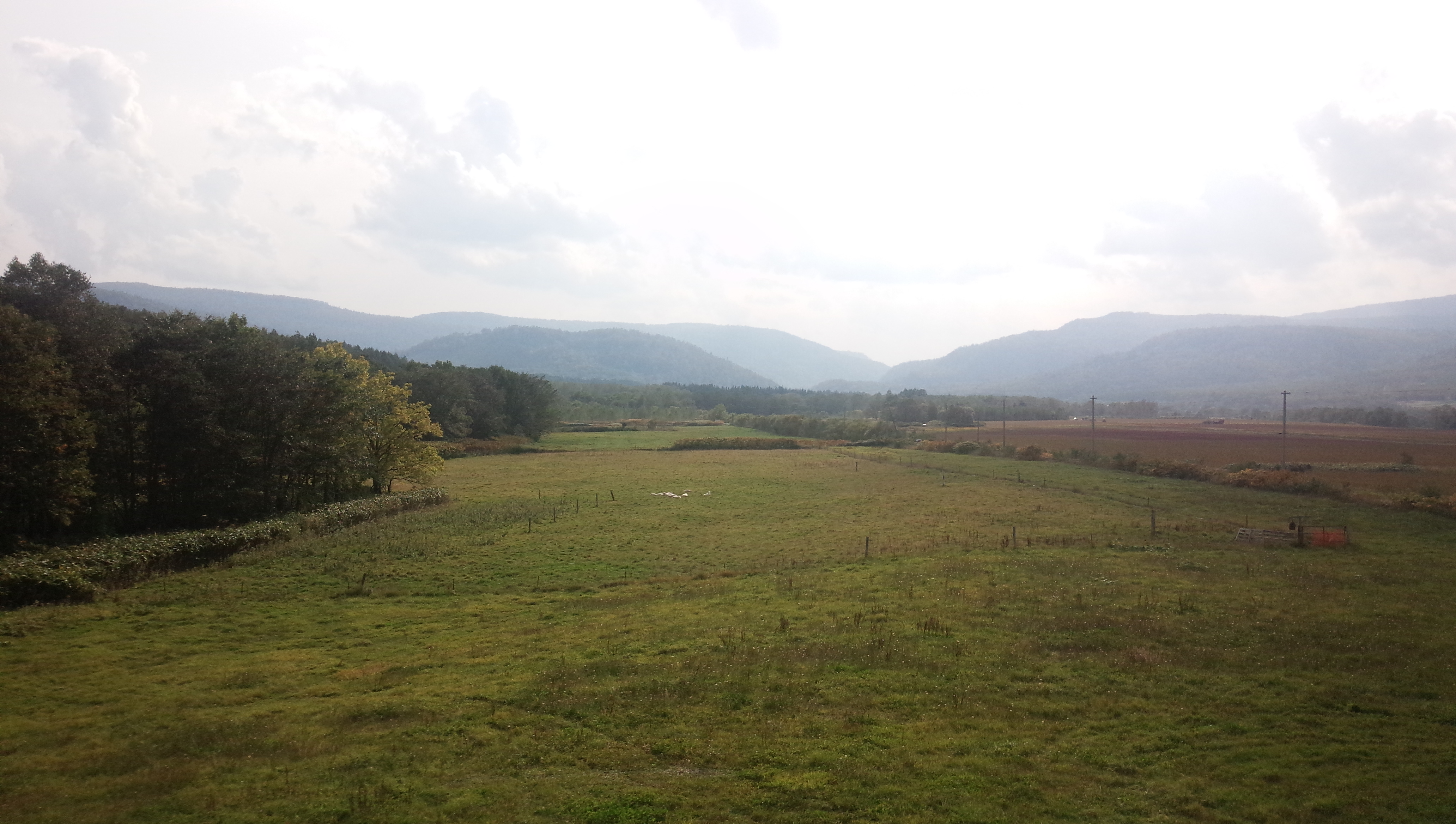 北海道美深町。松山農園